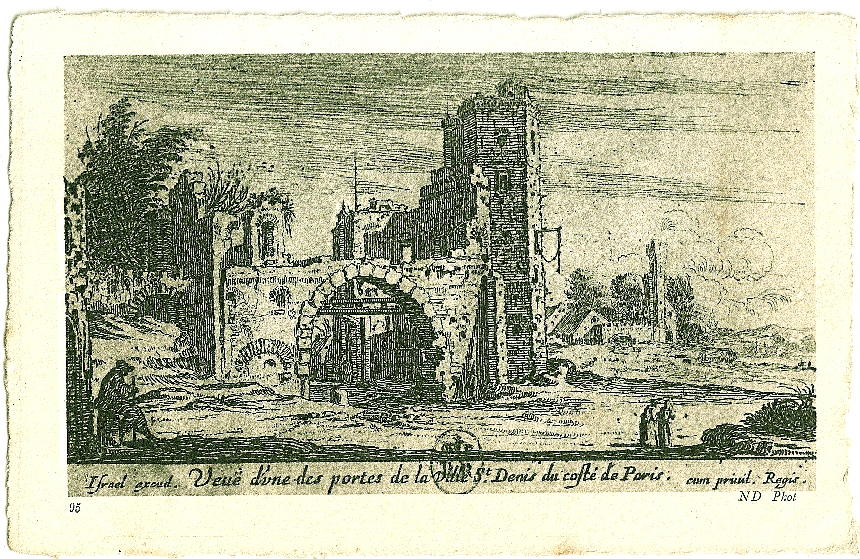 Carte postale ancienne éditée par ND, N°95Vue d'une des portes de Saint-Denis du coté de Paris